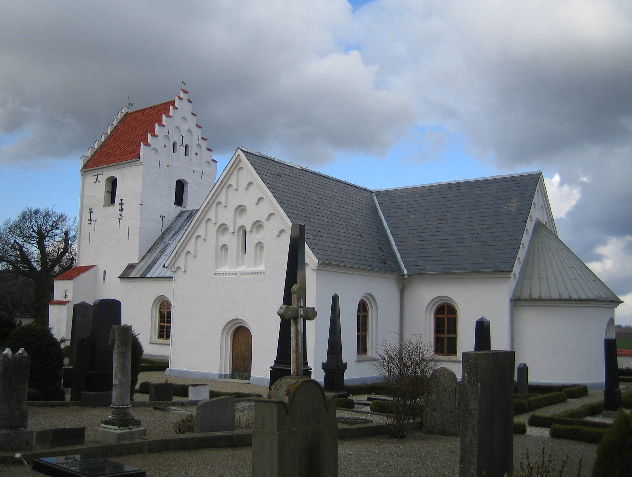 Bodarps kyrka, Skåne, Sweden